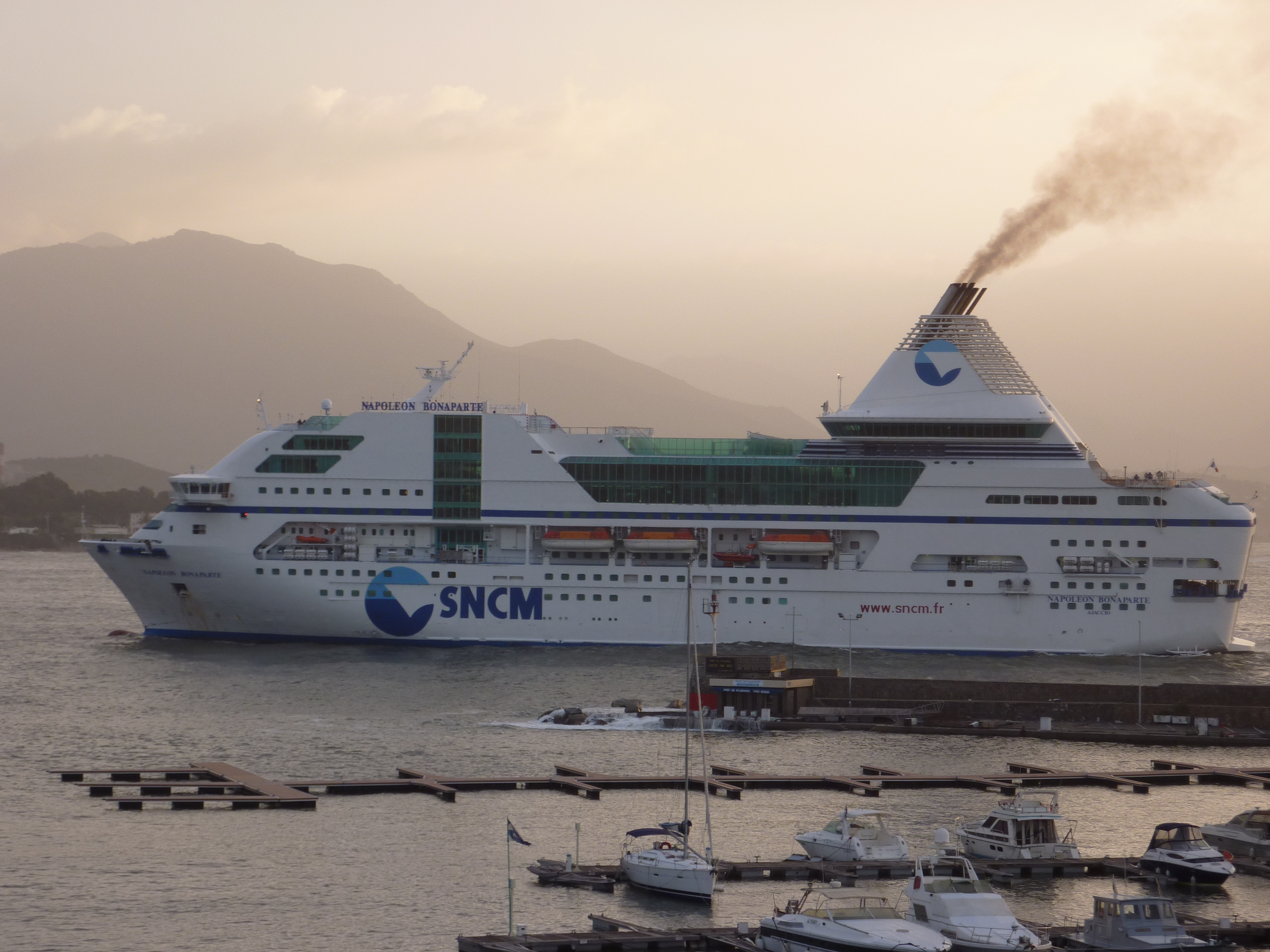 Ferry Napoléon Bonaparte